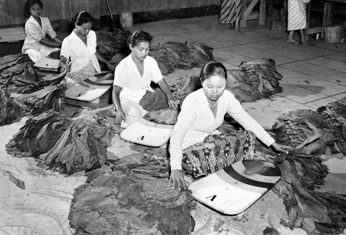 Repronegatief. Lengte-sortering van tabak